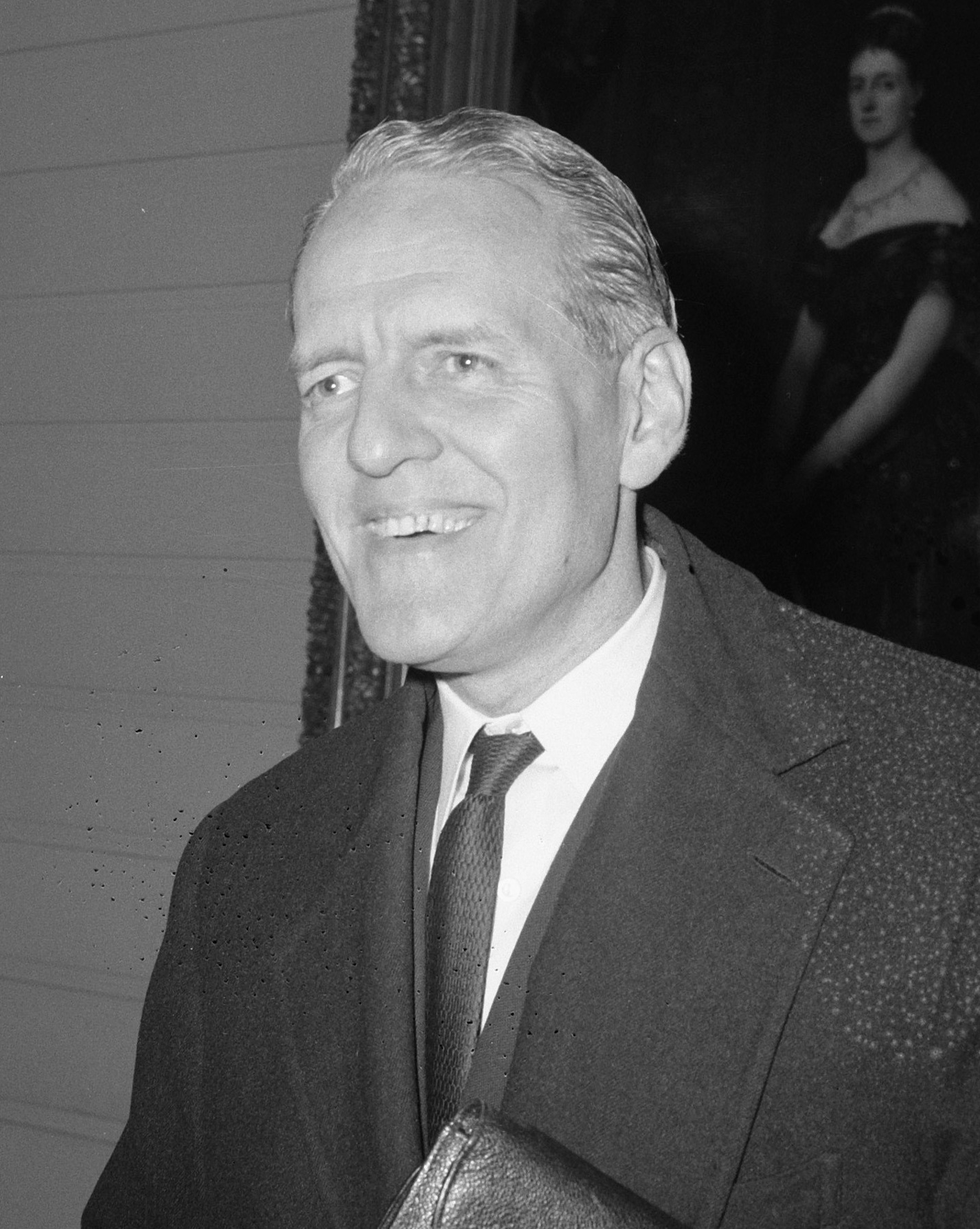 Minister Belgische Kabinet J. van Offelen (PVV), Minister van Economische Zaken